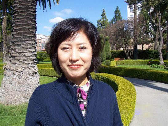 실리콘밸리를 방문한 소설가 은미희 작가